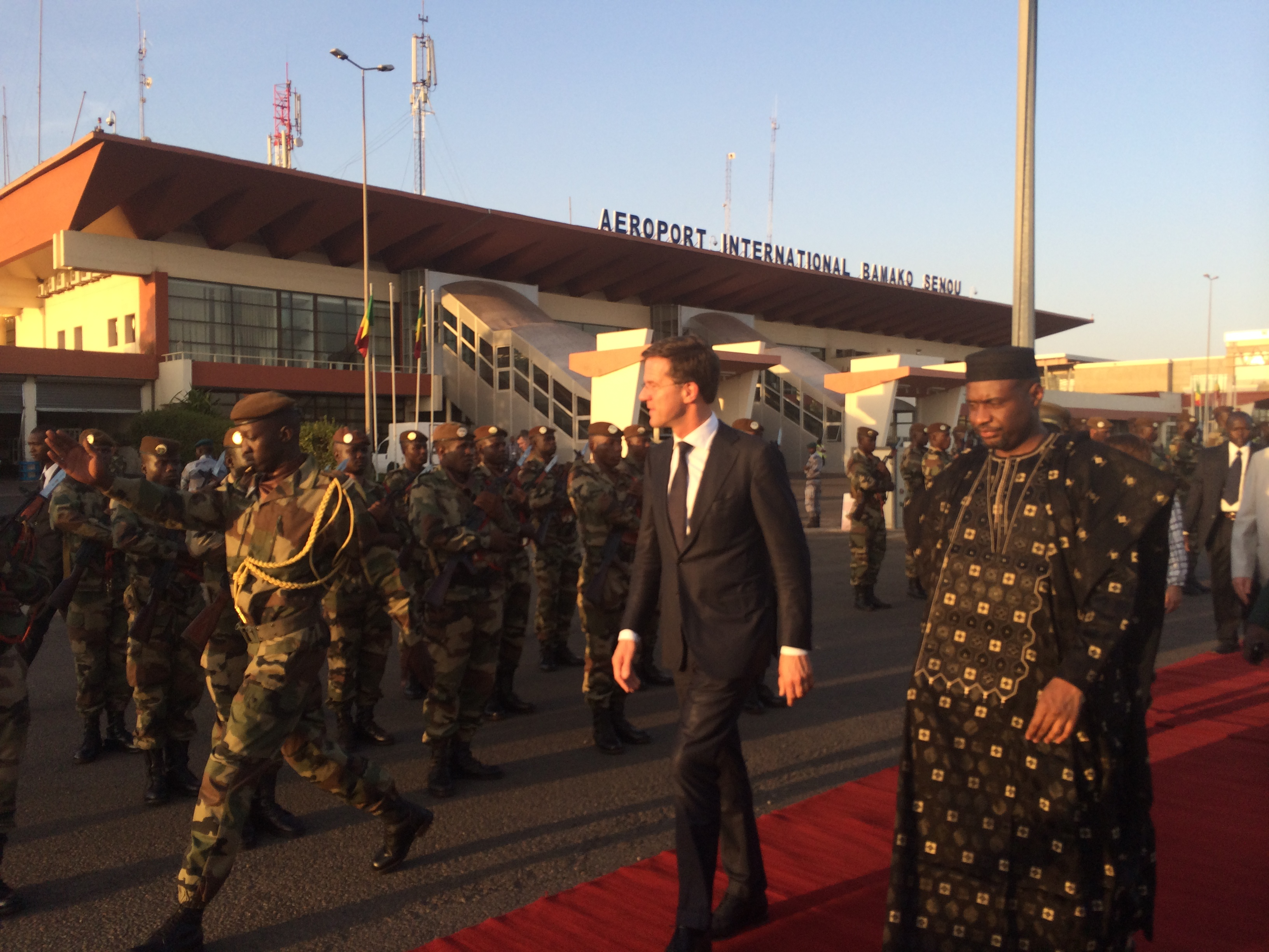 Fotostream Ministerpresident Mark Rutte